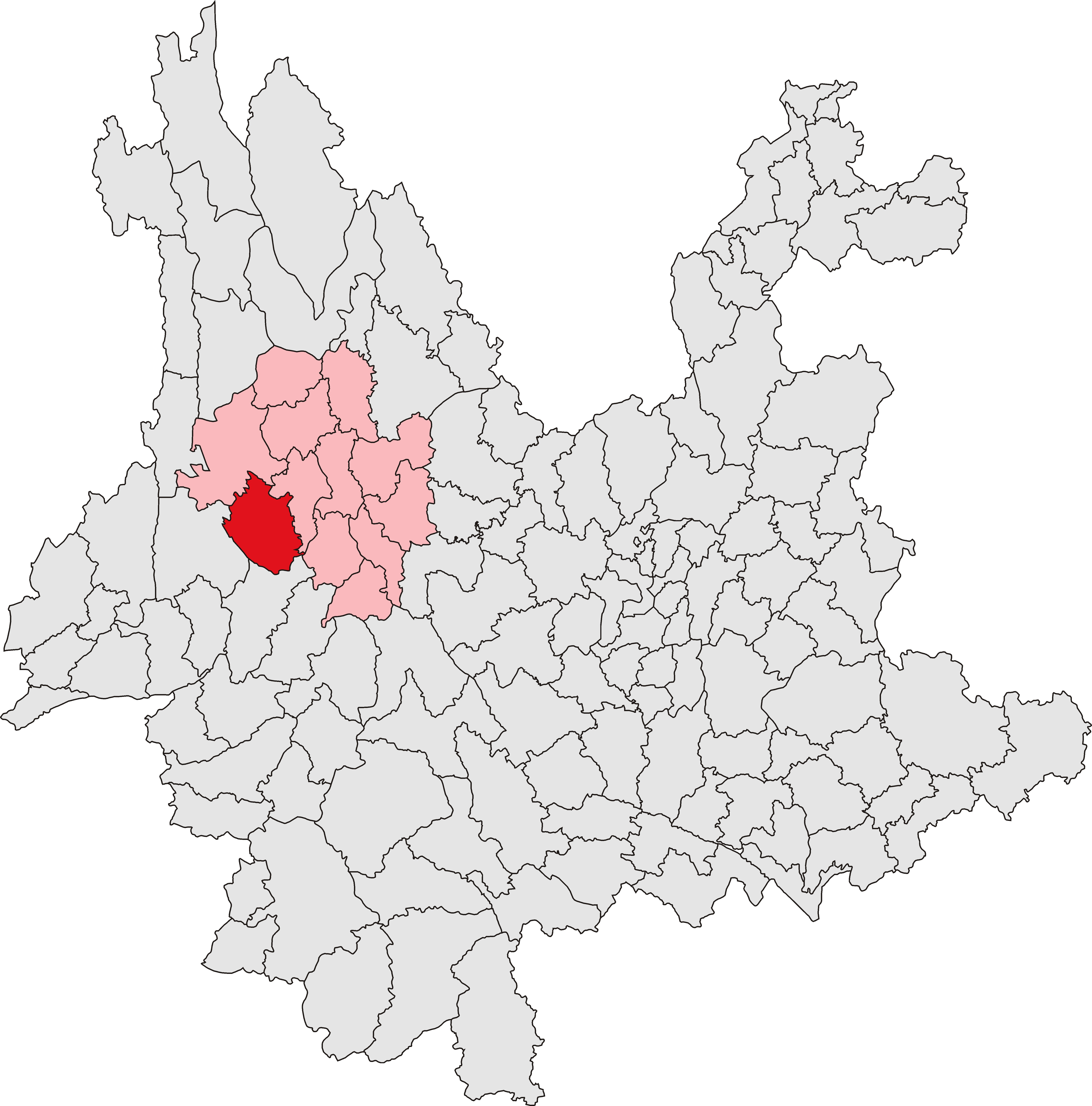 中文（中国大陆）: 永平县位置图